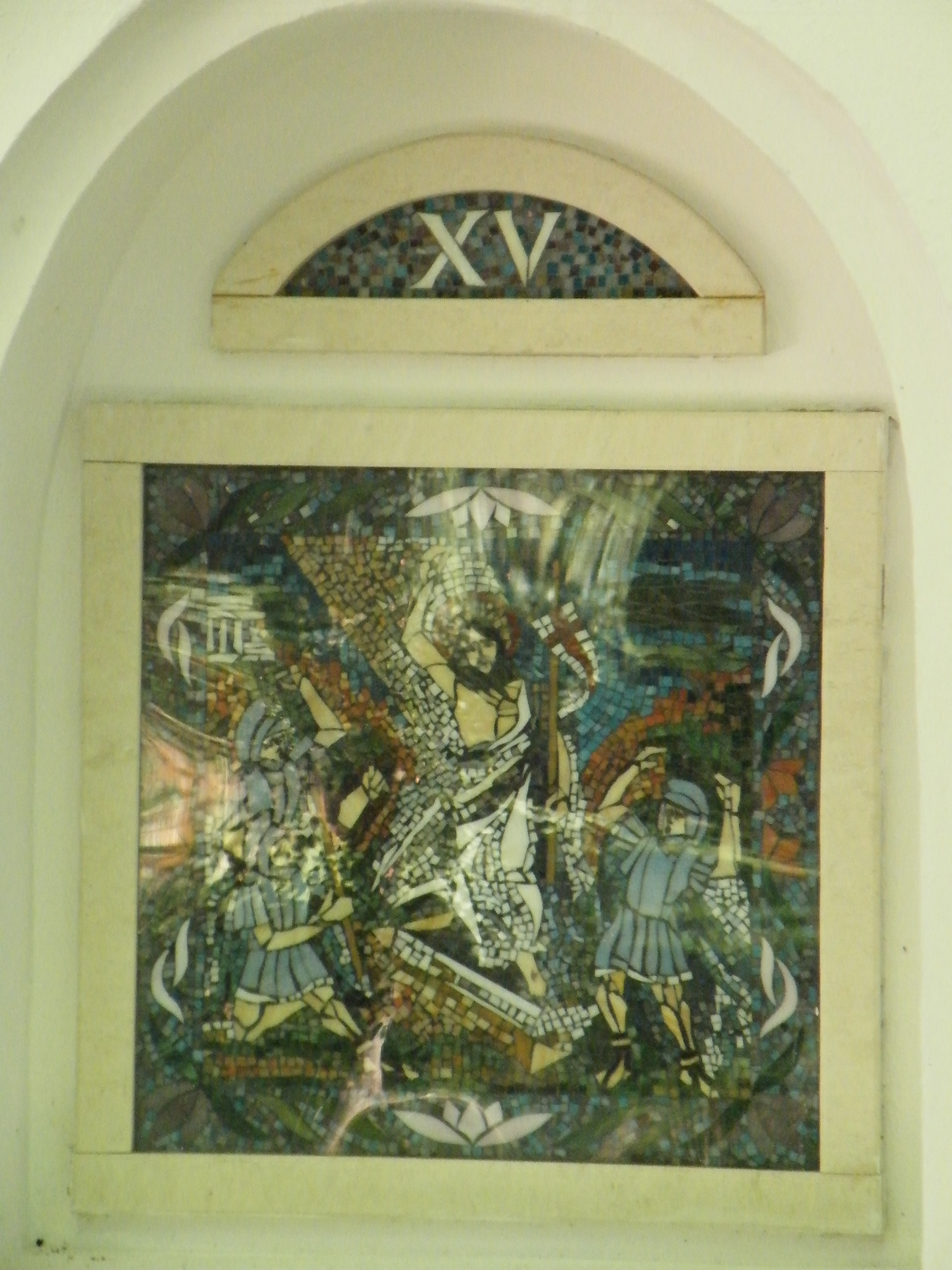 Stációk a Palóc ligetben, Balassagyarmaton